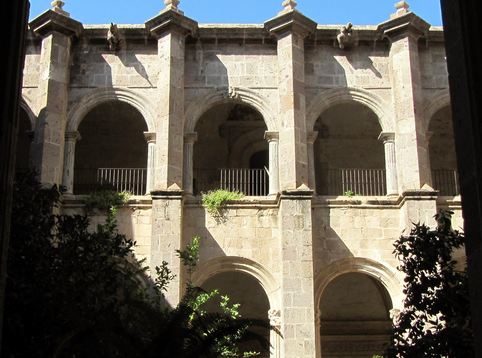 Claustro